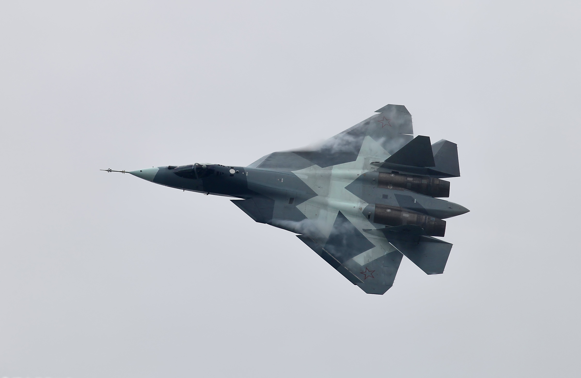 Т-50 ПАК ФА (T-50 PAK FA)